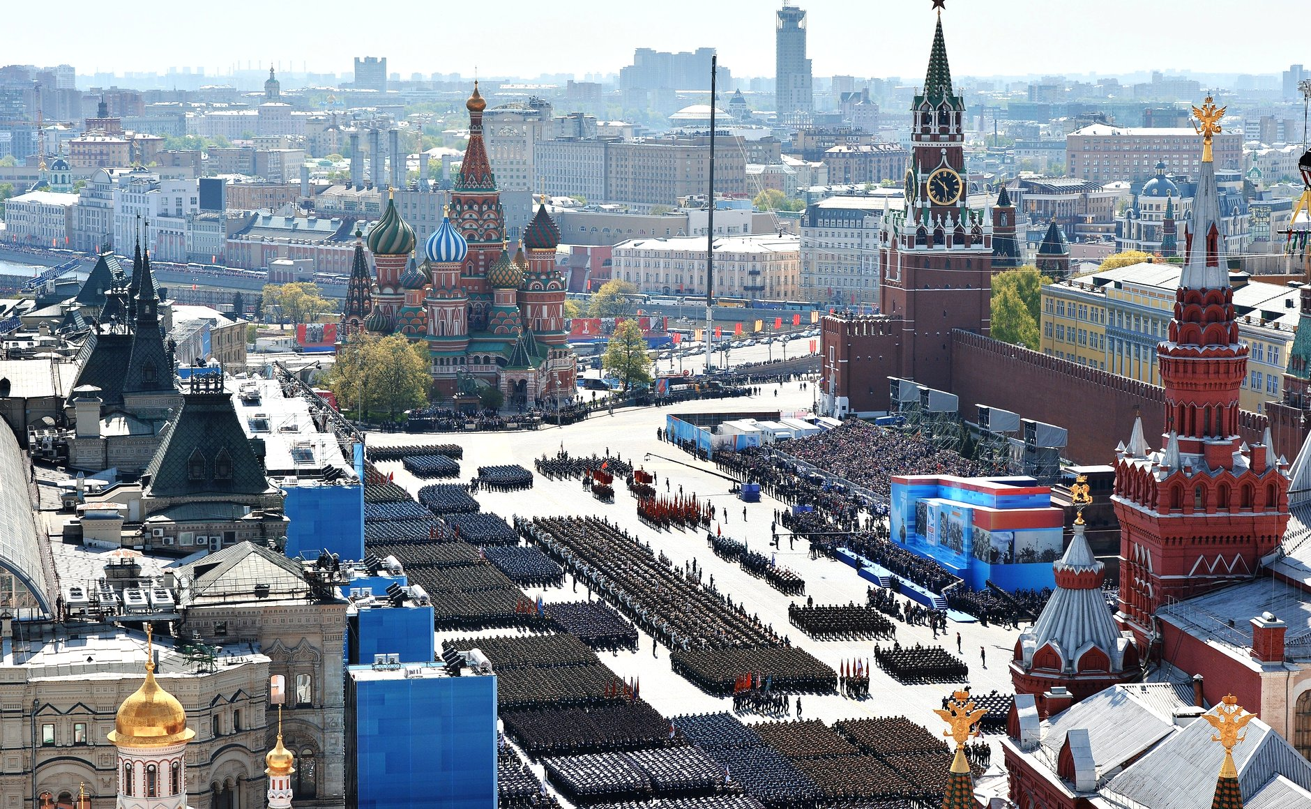 Военный парад в ознаменование 70-й годовщины Победы в Великой Отечественной войне 1941–1945 годов.